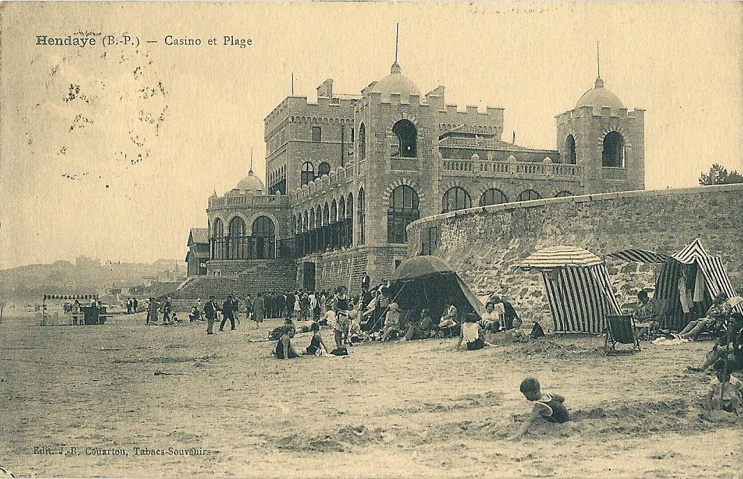 Hendaye (Basses-Pyrénées) - Casino & Plage - vers 1930